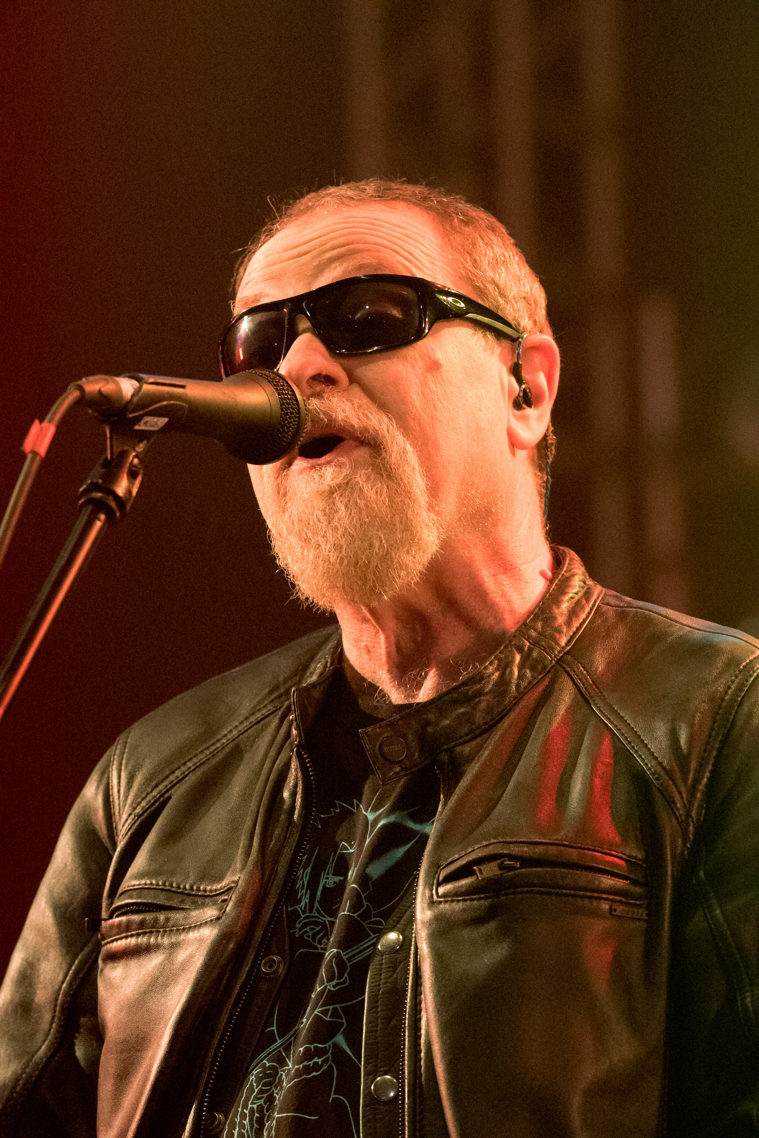 Blue Öyster Cult beim Wacken Open Air 2016